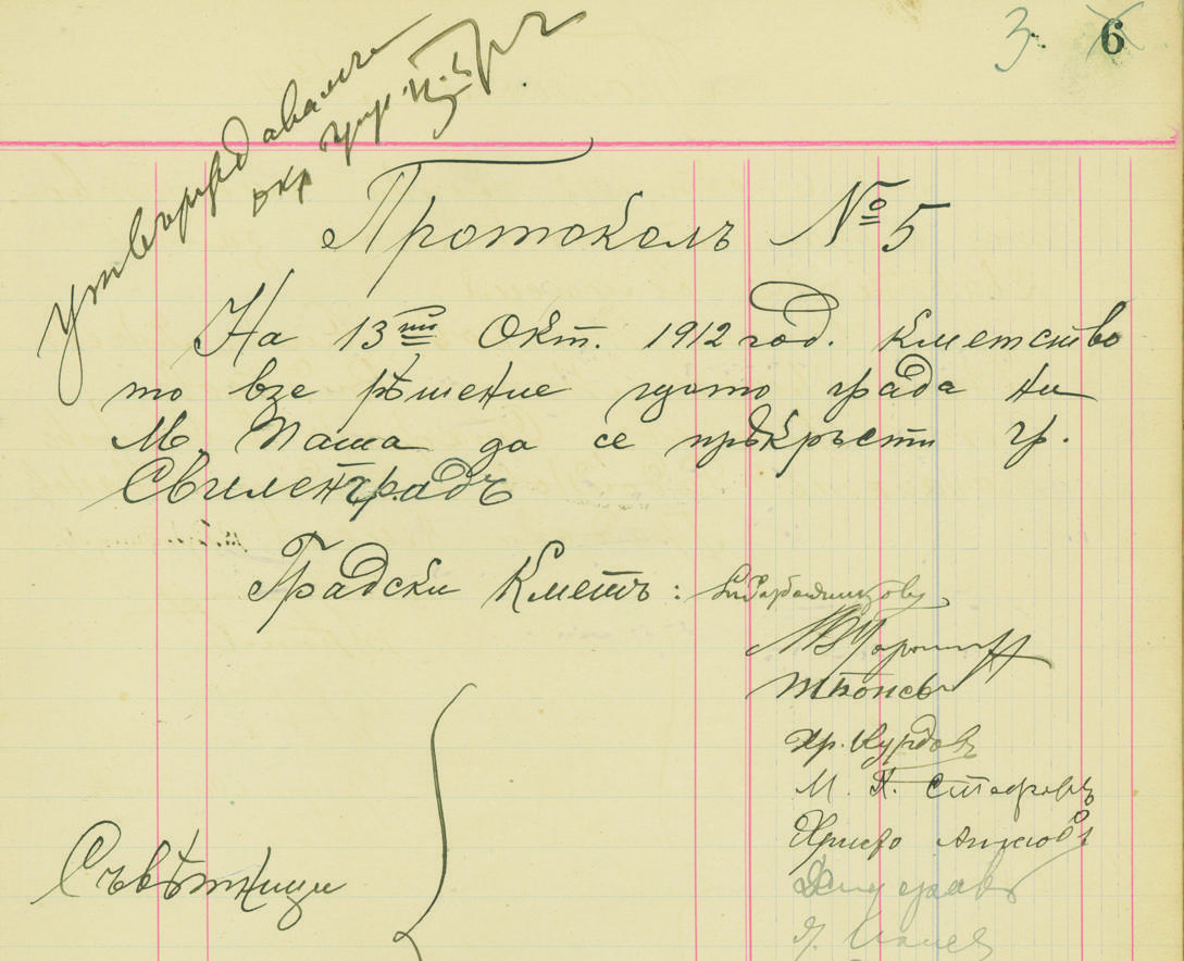 Протоколно решение на общинския съвет в Мустафапаша, с което градът е прекръстен на Свиленград, 13 октомври 1912